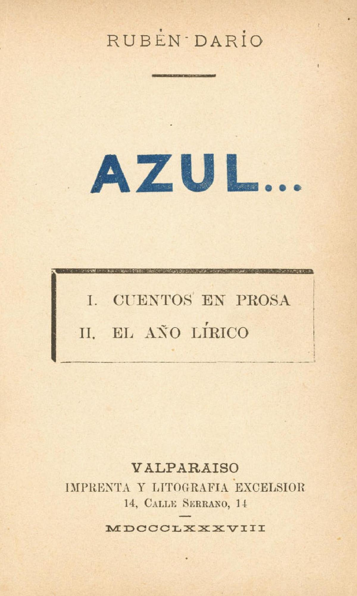 Azul... es un libro de cuentos y poemas del poeta nicaragüense Rubén Darío, considerado una de las obras más relevantes del modernismo hispánico. Se publicó por primera vez en Valparaíso el 30 de julio de 1888. Dos años después, en Guatemala, apareció una segunda edición, corregida y aumentada.